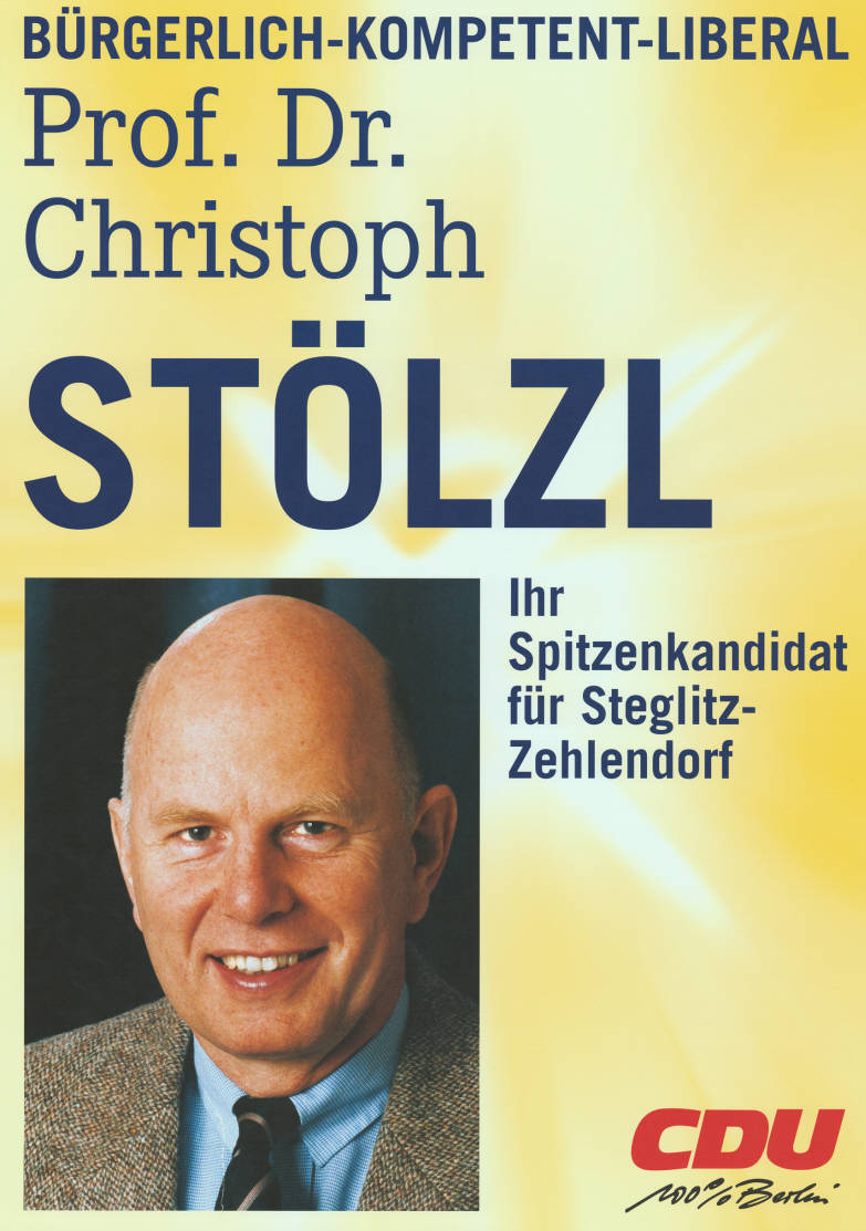 Bürgerlich - Kompetent - Liberal Prof. Dr. Christoph Stölzl Ihr Spitzenkandidat für Steglitz- Zehlendorf CDU 100% Berlin Abbildung: Porträtfoto Plakatart: Kandidaten/Personenplakat mit Objekt-Signatur: 10-004 : 1405 Bestand: Plakate zu Abgeordnetenhauswahlen Berlin (10-004) GliederungBestand10-18: Plakate zu Abgeordnetenhauswahlen Berlin (10-004) » CDU Lizenz: KAS/ACDP 10-004 : 1405 CC-BY-SA 3.0 DE